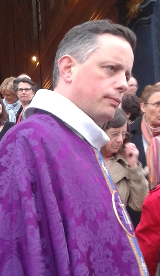 Bruno Valentin, en mars 2014, lors de la messe d'action de grâce de Mgr Olivier Leborgne. Il était alors curé de la paroisse Montigny-Voisins.